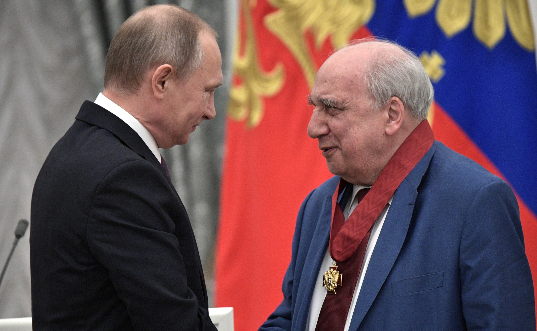 На церемонии вручения государственных наград. Орденом «За заслуги перед Отечеством» II степени награждён Александр Чубарьян – академик Российской академии наук, научный руководитель Института всеобщей истории Российской академии наук